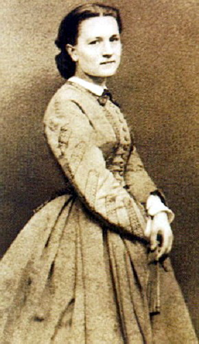 Пелагея Тургенева (в замуж. Бюэр, 1842-1918), дочь писателя Ивана Тургенева.